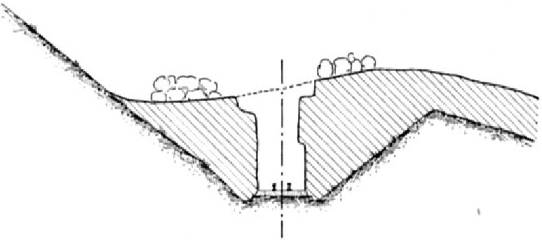 Lawinenabgänge auf die Gotthardbahn bei Wassen am 15. Februar 1888: Querschnitt bei km 62,95